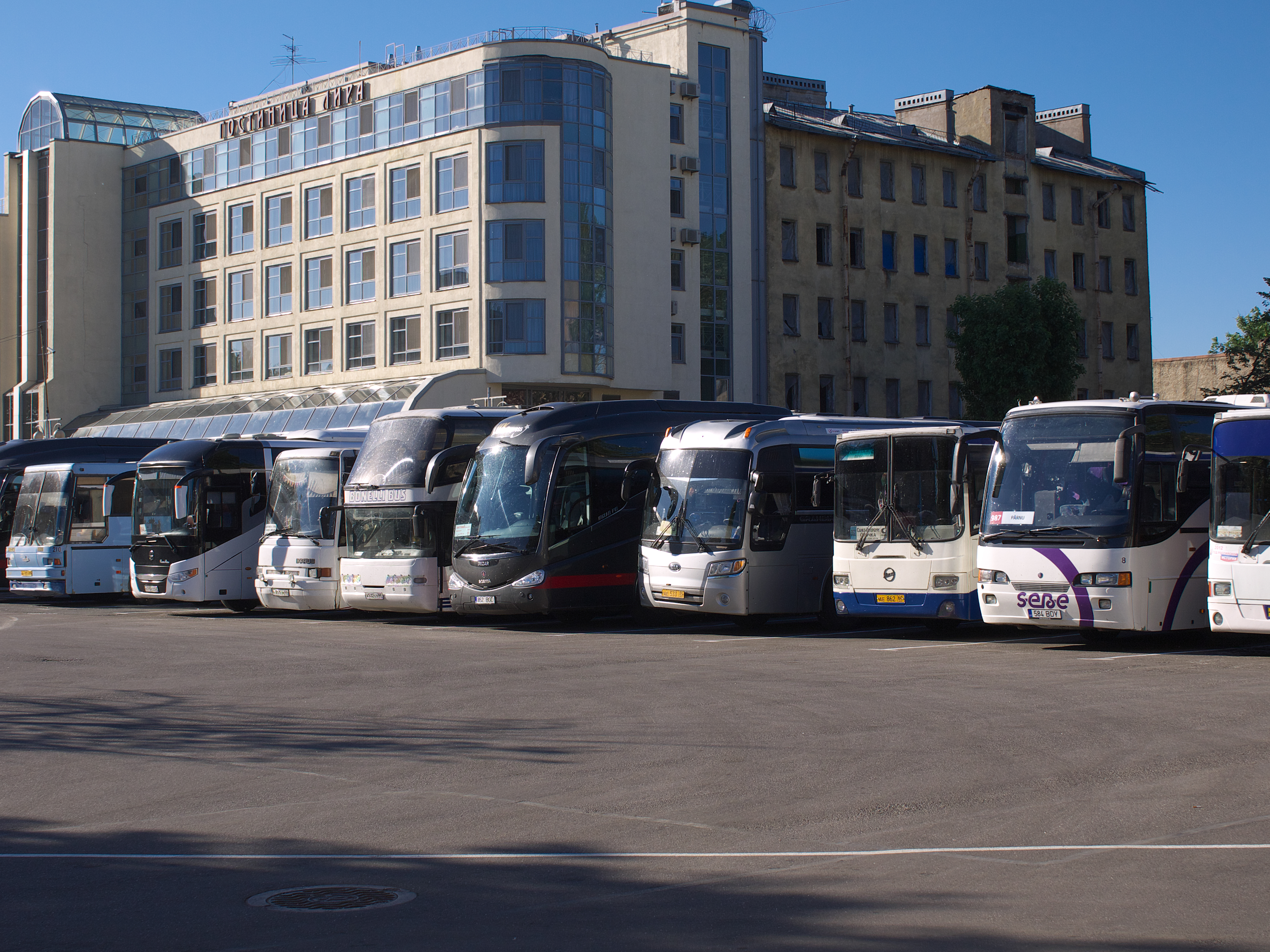 Автовокзал №2